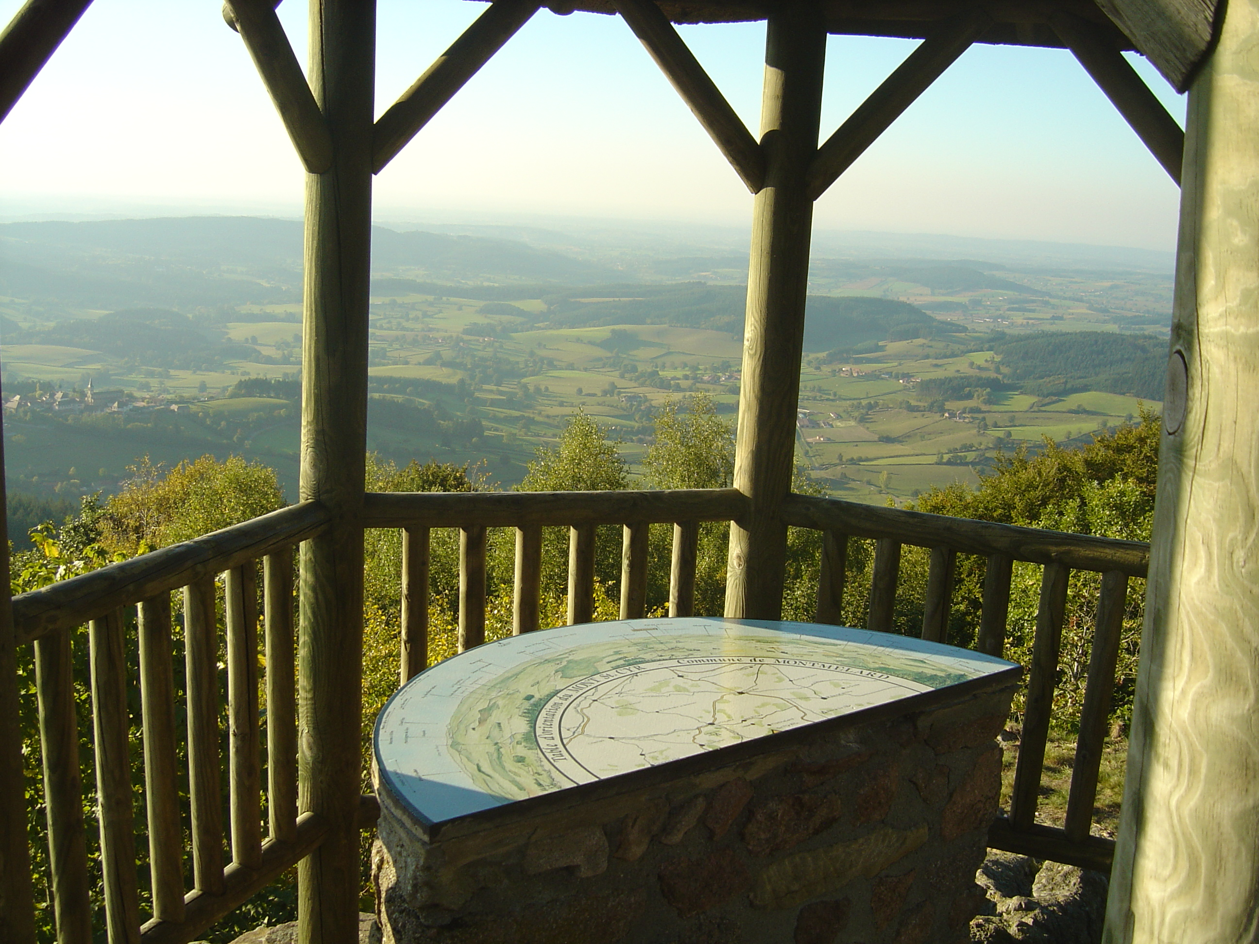 L'une des trois tables d'orientation du Mont Saint-Cyr (771m) en Bourgogne